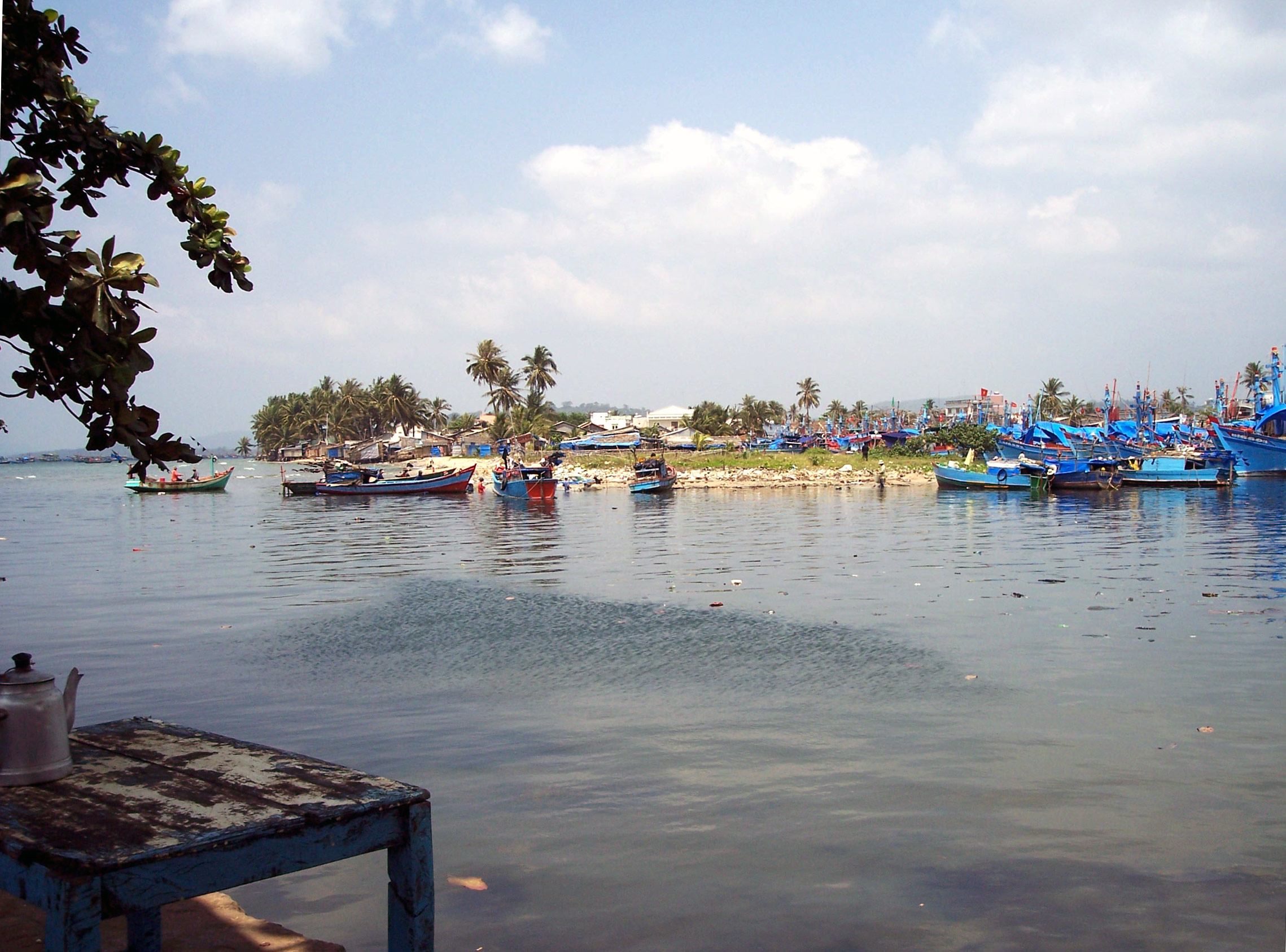 Hafen von Duong Dong